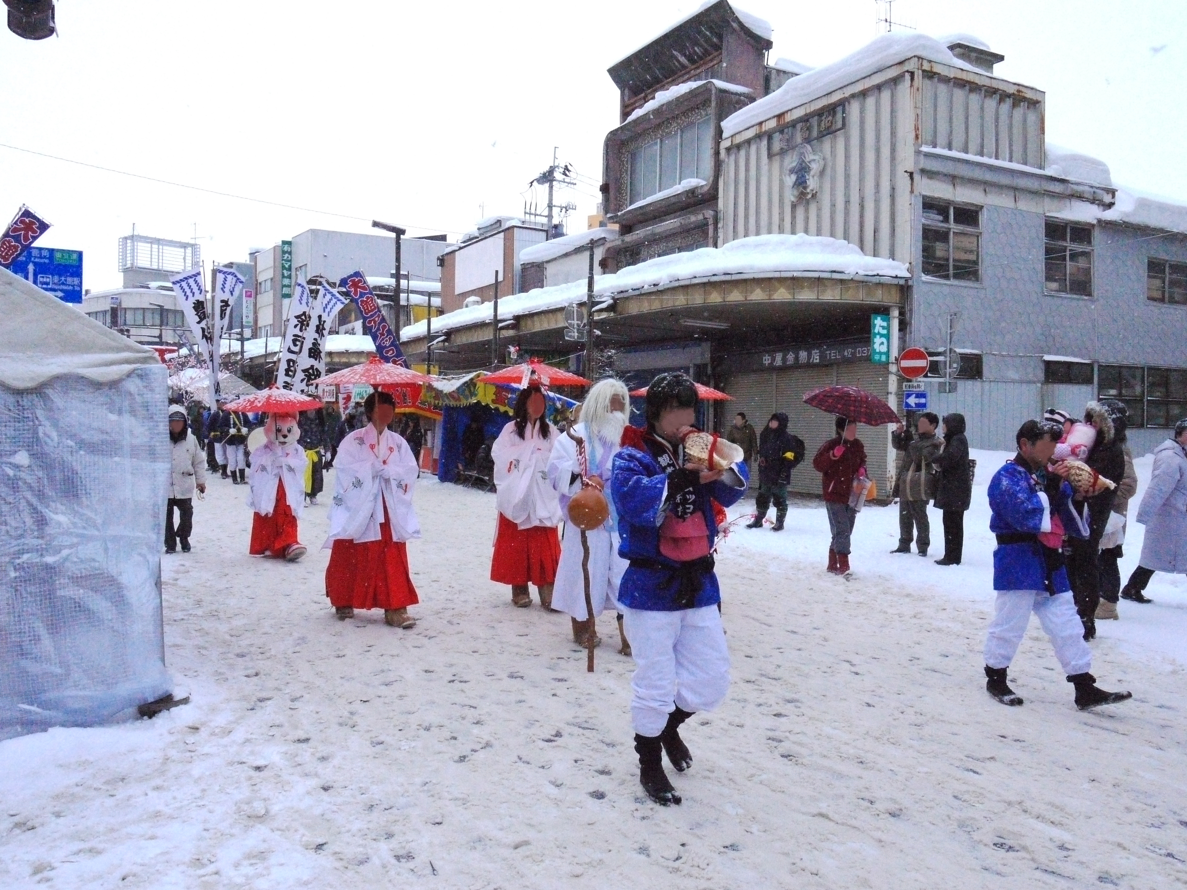 アメッコ市 秋田県大館市 (顔の部分を加工してあります)